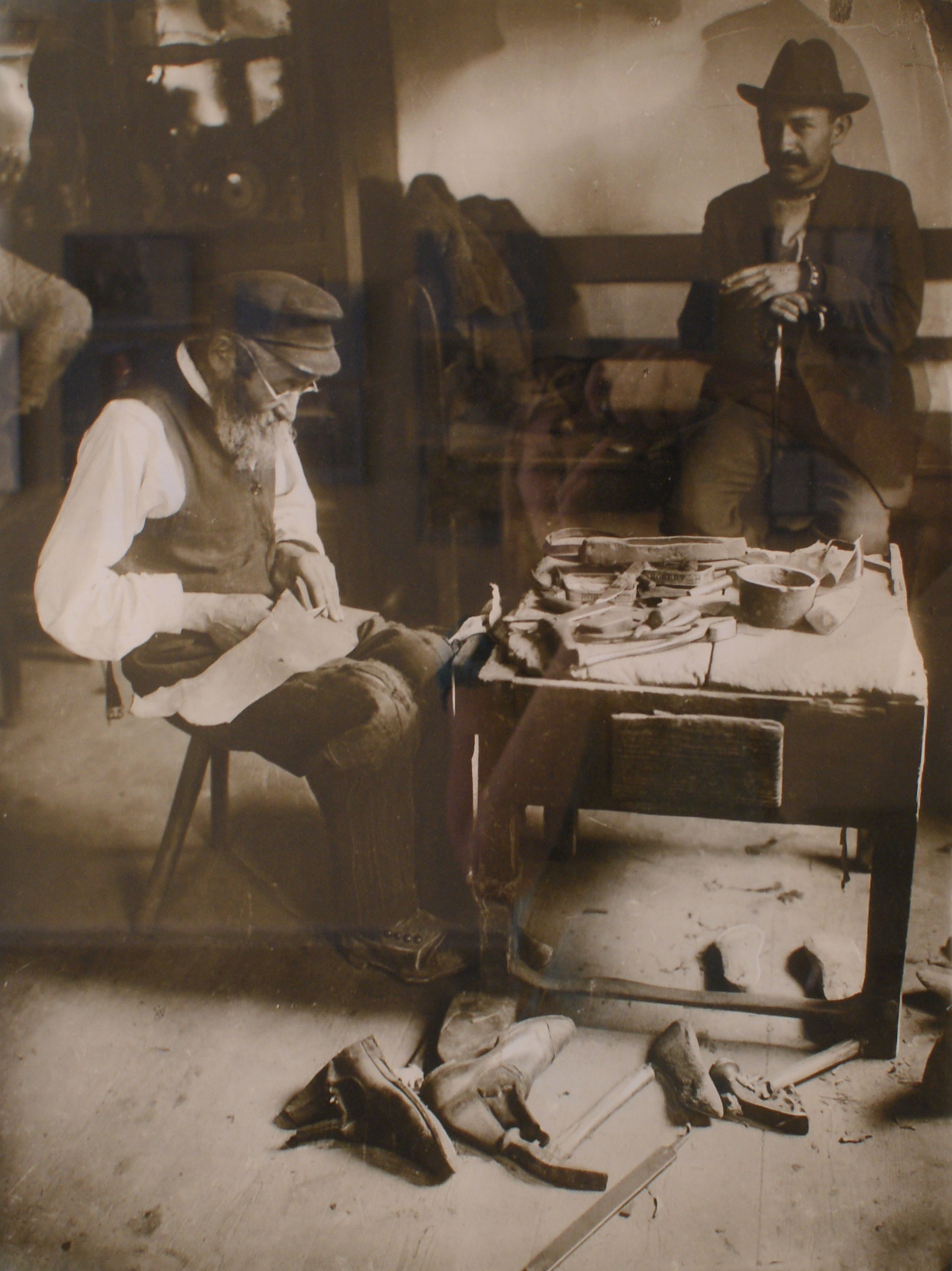 Шавец, Валынская губерня, г. Крамянец. Фота С. Юдовіна. Копія, Арыгінал захоўваецца ў Расійскім этнаграфічным музеі, Санкт-Пецярбург